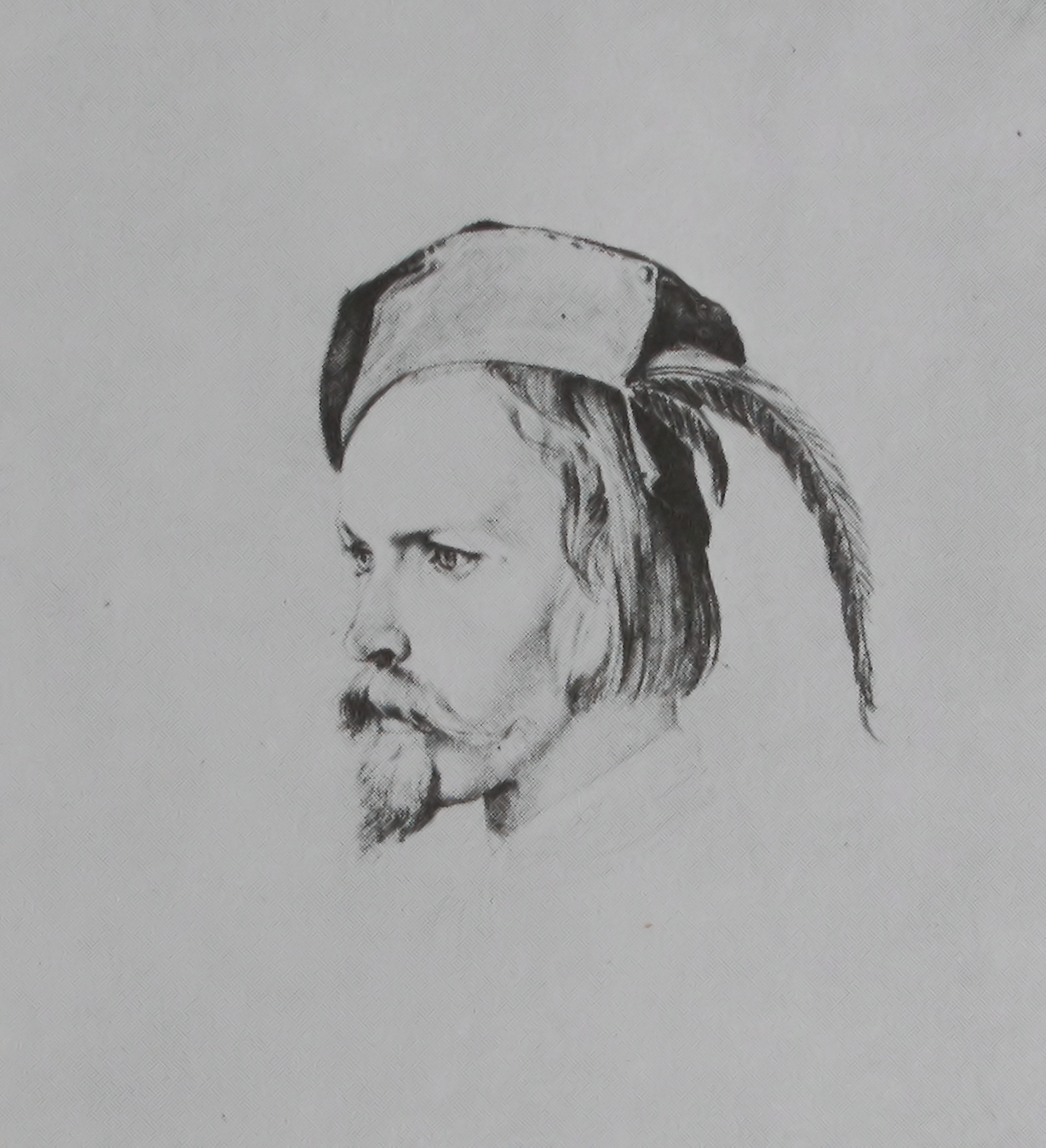 Der Maler Daniel Fohr; Bleistiftzeichung